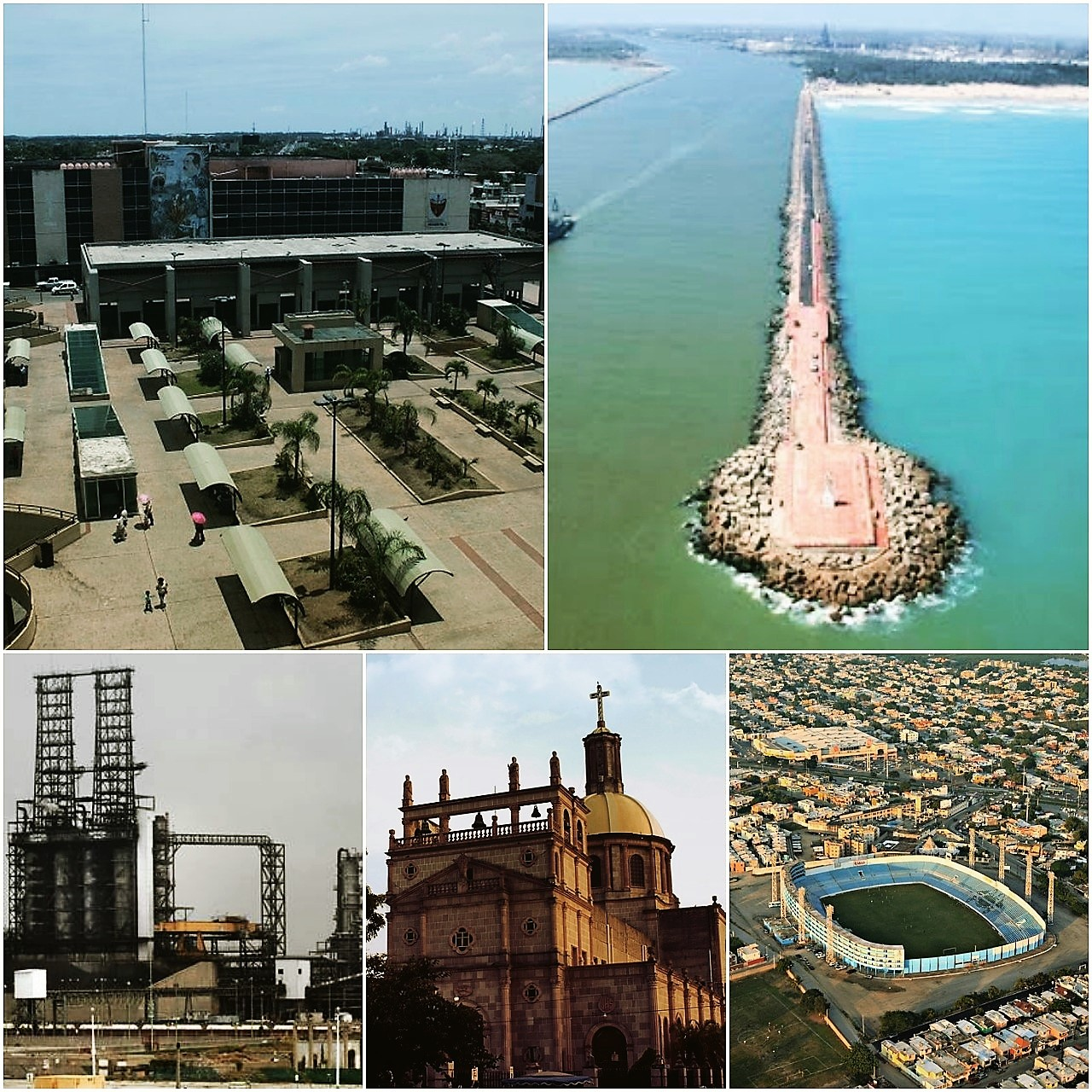 Ciudad Madero